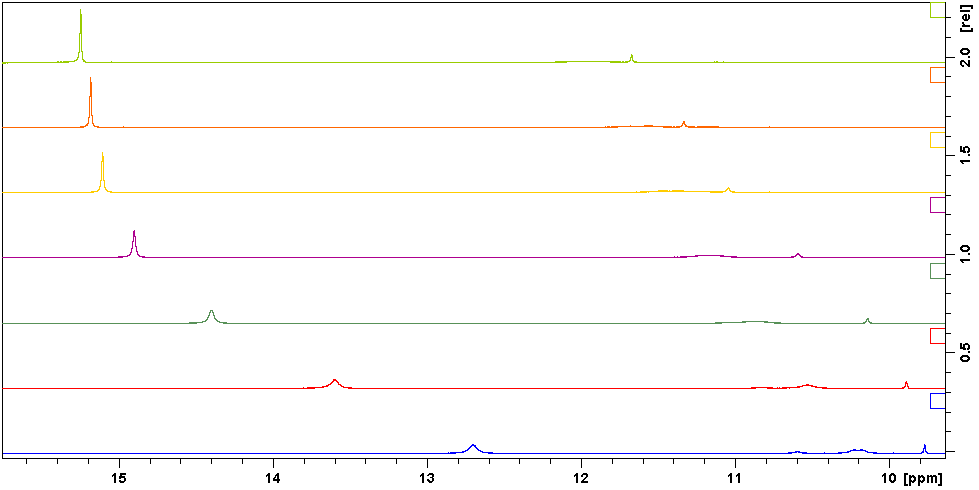 TMR analüüsi käigus muutub tiitrimise tulemusena võõrustaja-külalise kompleksi seostumisasukoht. Graafikul kulgeb tiitrimine suunaga alt üles.